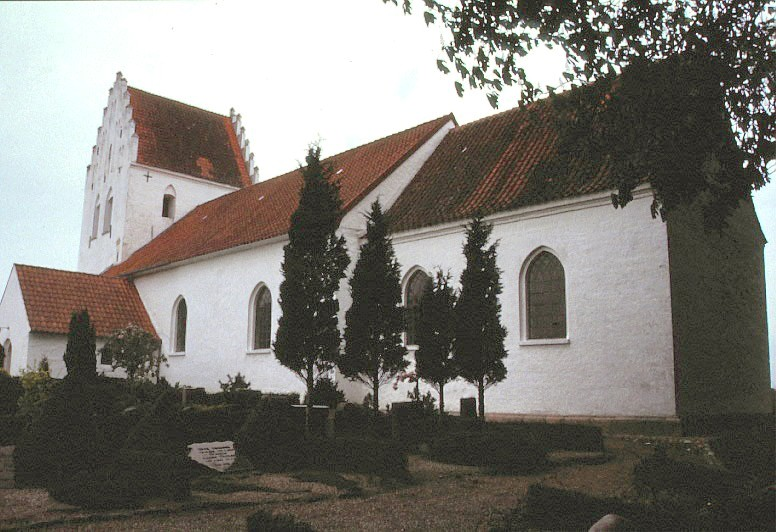 Ørsted Kirke (Assens Kommune) i Danmark. Ørsted kirke